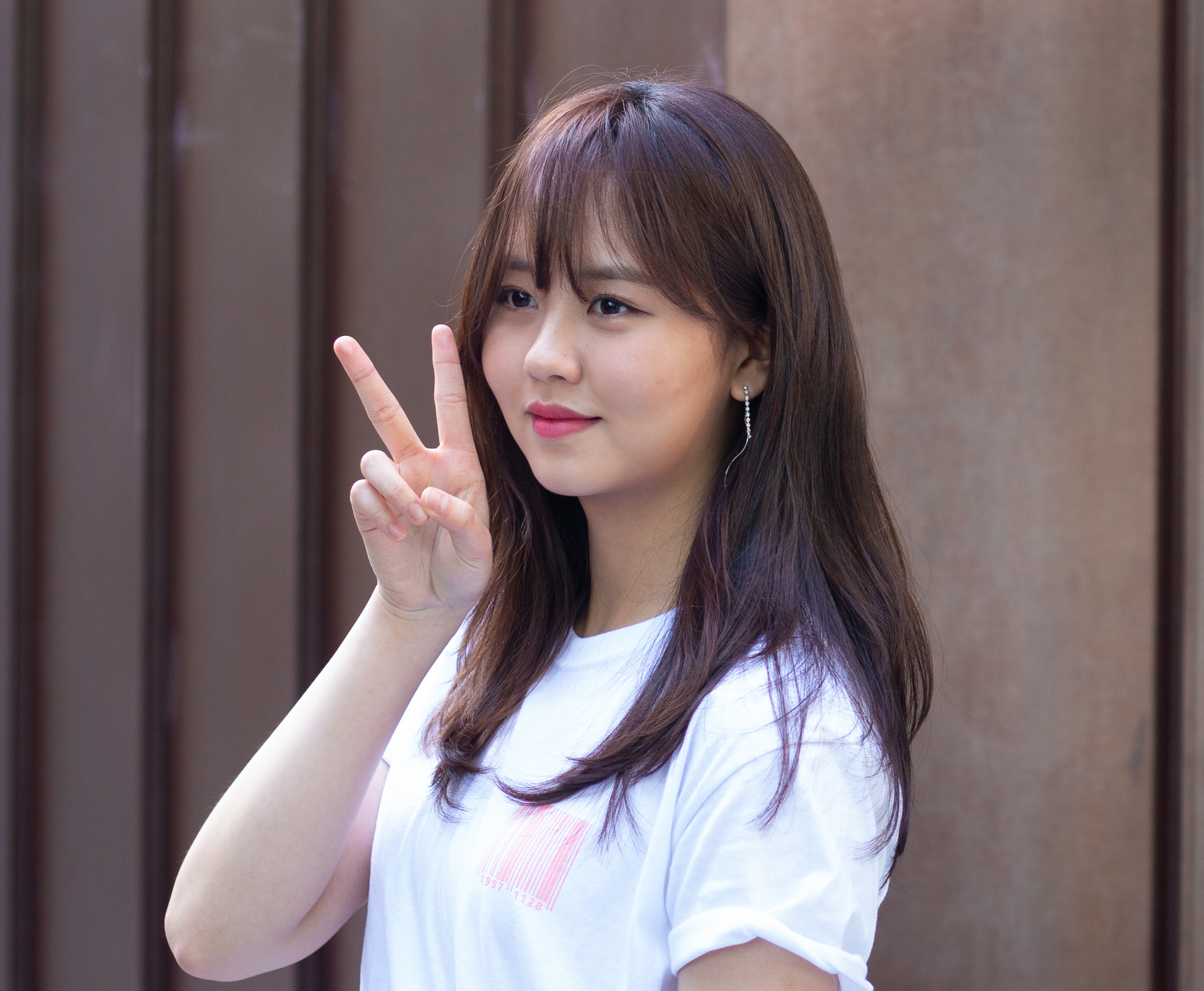 20180421 김소현 SES 그린하트 바자회